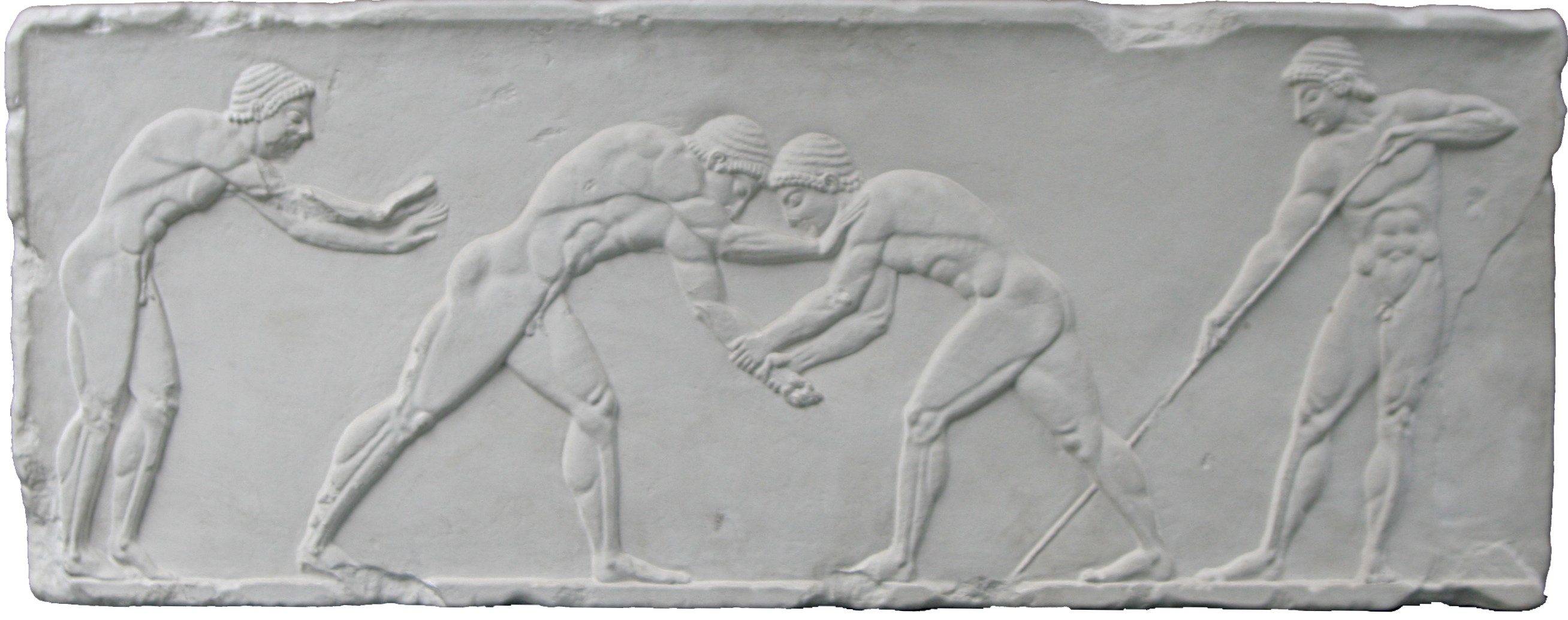 Abguss eines Reliefs mit drei Disziplinen des Fünfkampfes. Läufer am Start, Ringkampf, Speerwerfen. Original Athen, Nationalmuseum. Photographed by me in Glyptothek Munich